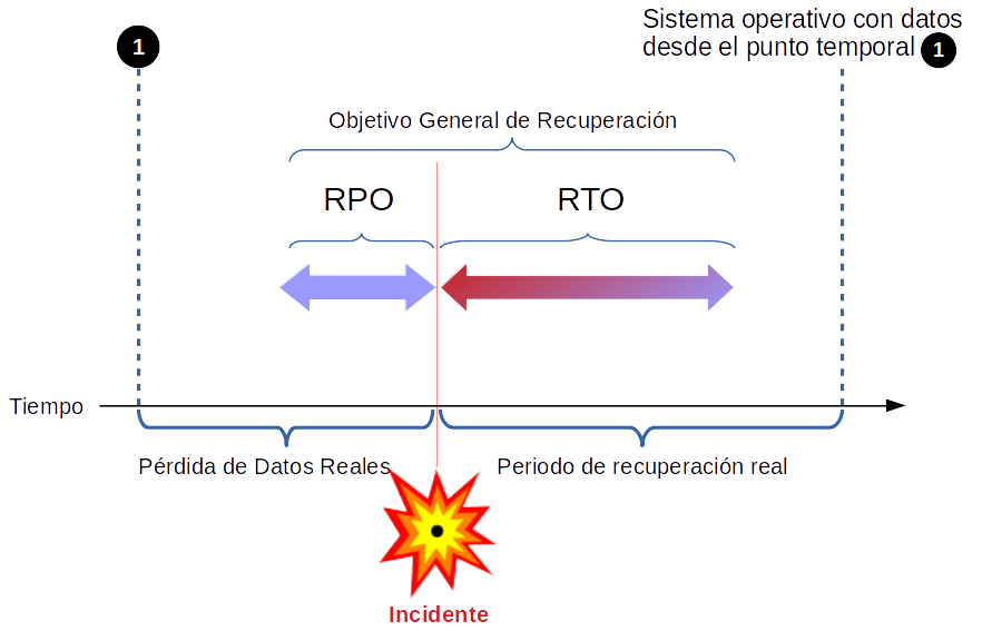 Forma esquemática de cómo se relacionan los conceptos